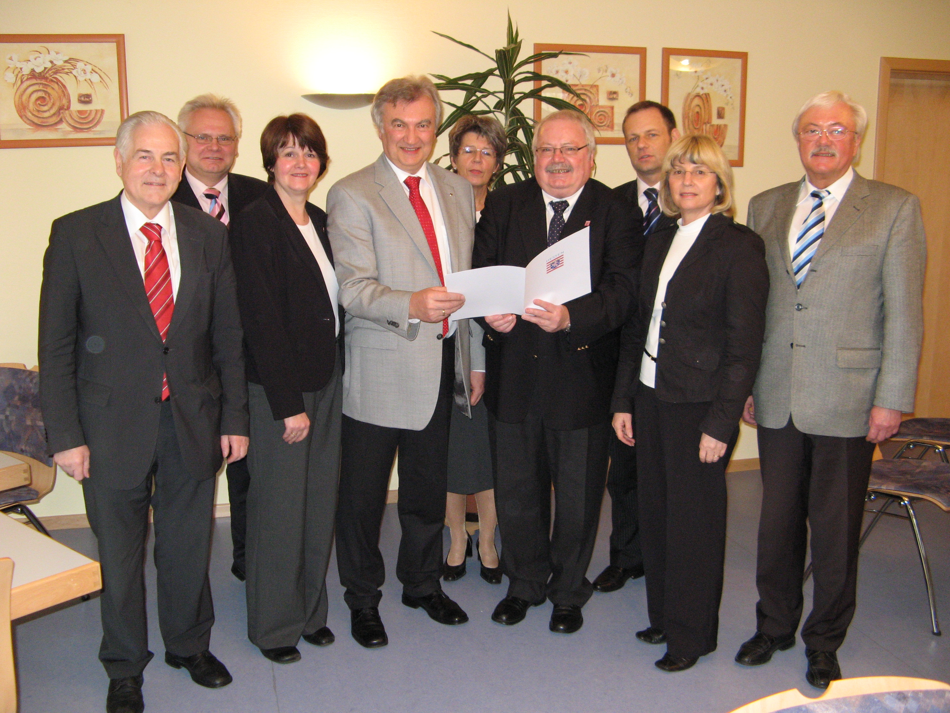 Übergabe des Anerkennungsbescheides als Leader-Region